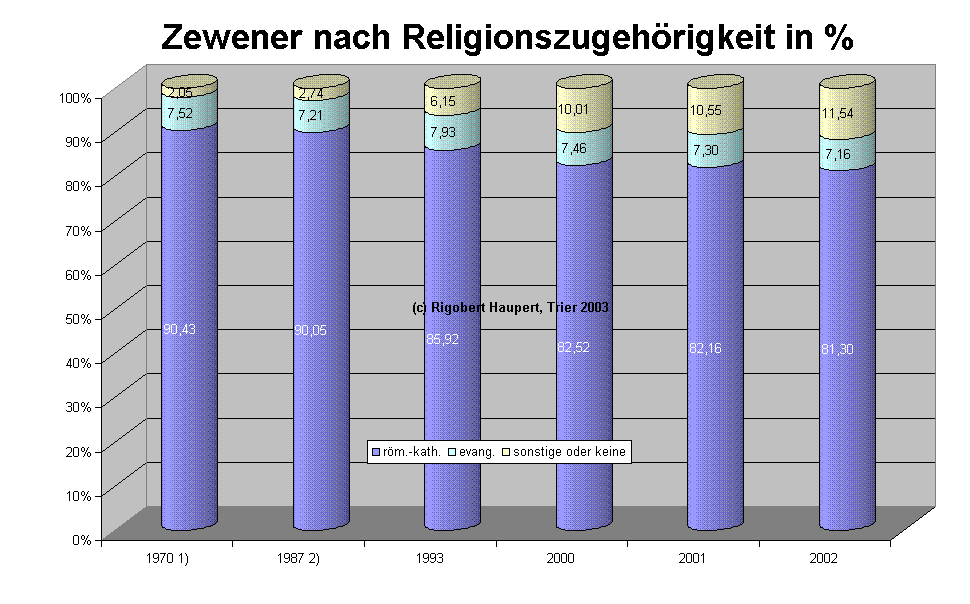 Rigobert Haupert freigegeben